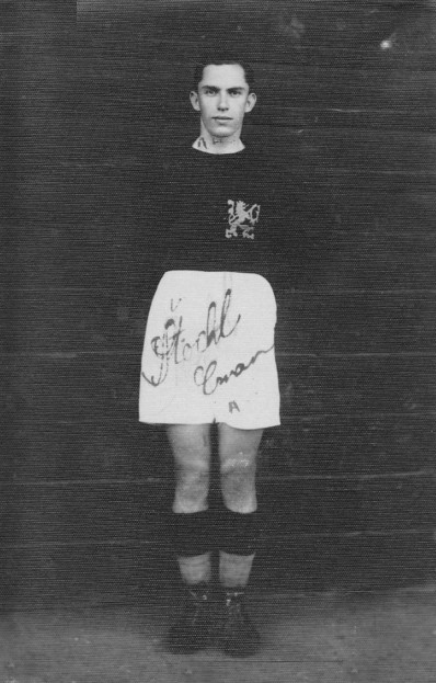 Emanuel Štochl (1910-1996), český fotbalový útočník a později funkcionář